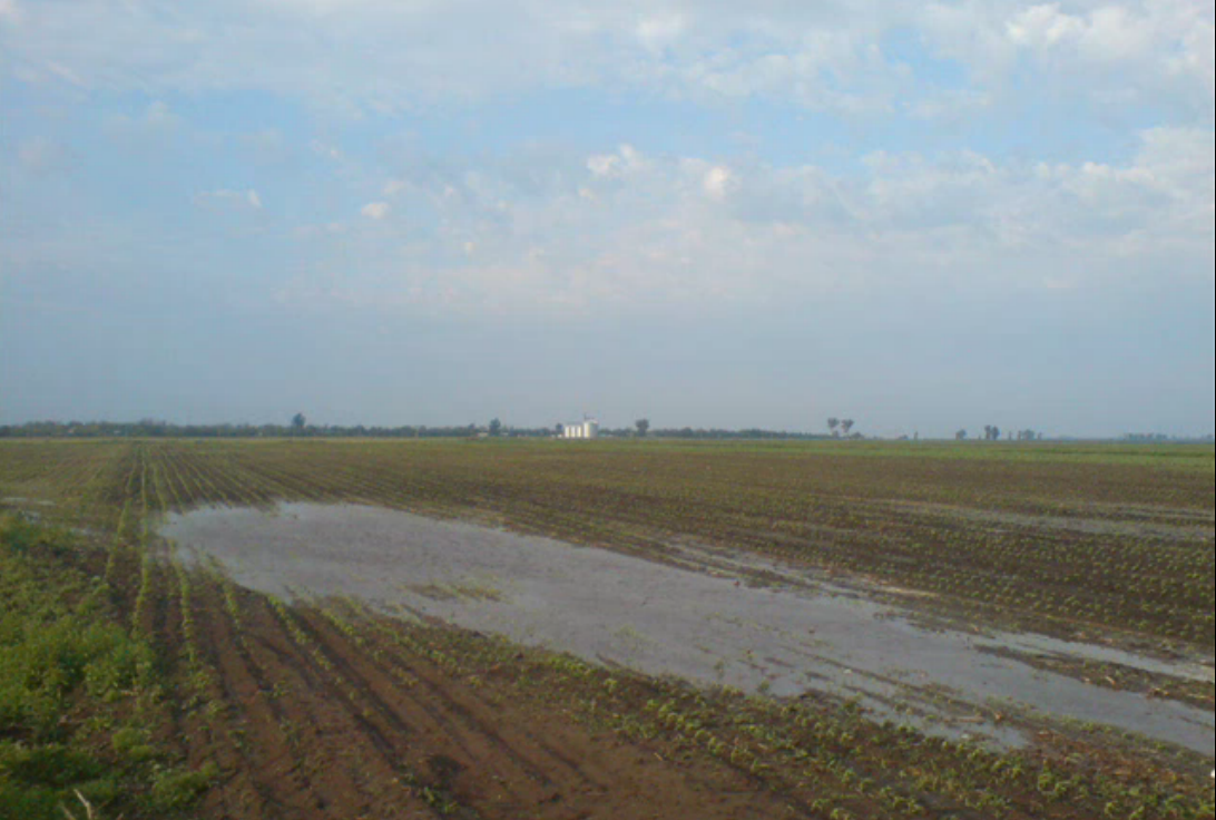 Câmp semănat, zona Boi Negri, Bordei Verde, judeţul Brăila. În fundal sw vede Baza de receptie cereale a SC Prutul SA Mai 2012